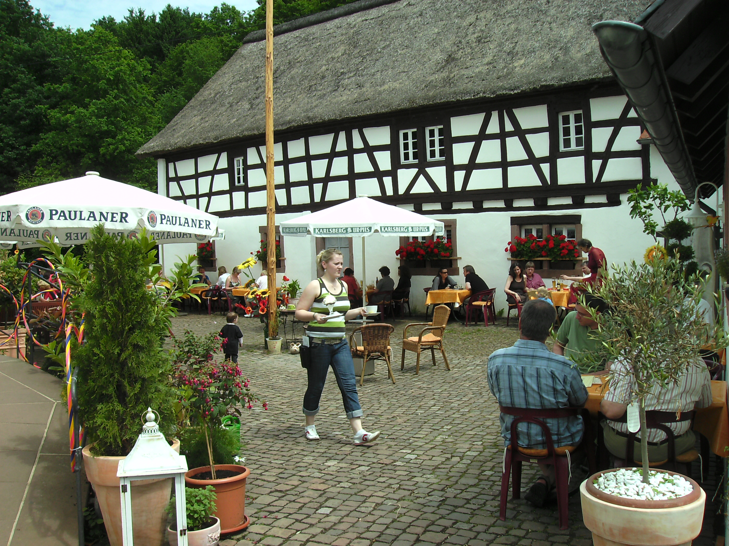 Tholey: Johann-Adams-Mühle im Ortsteil Theley